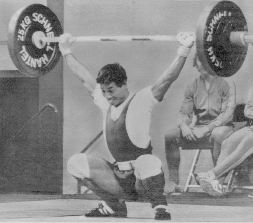 LG57 1972 Wire Photo GYI AUNG Burmese Olympic Weight Lifter Munich Messegelande